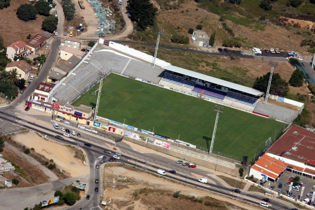 Ange-Casanova 2011